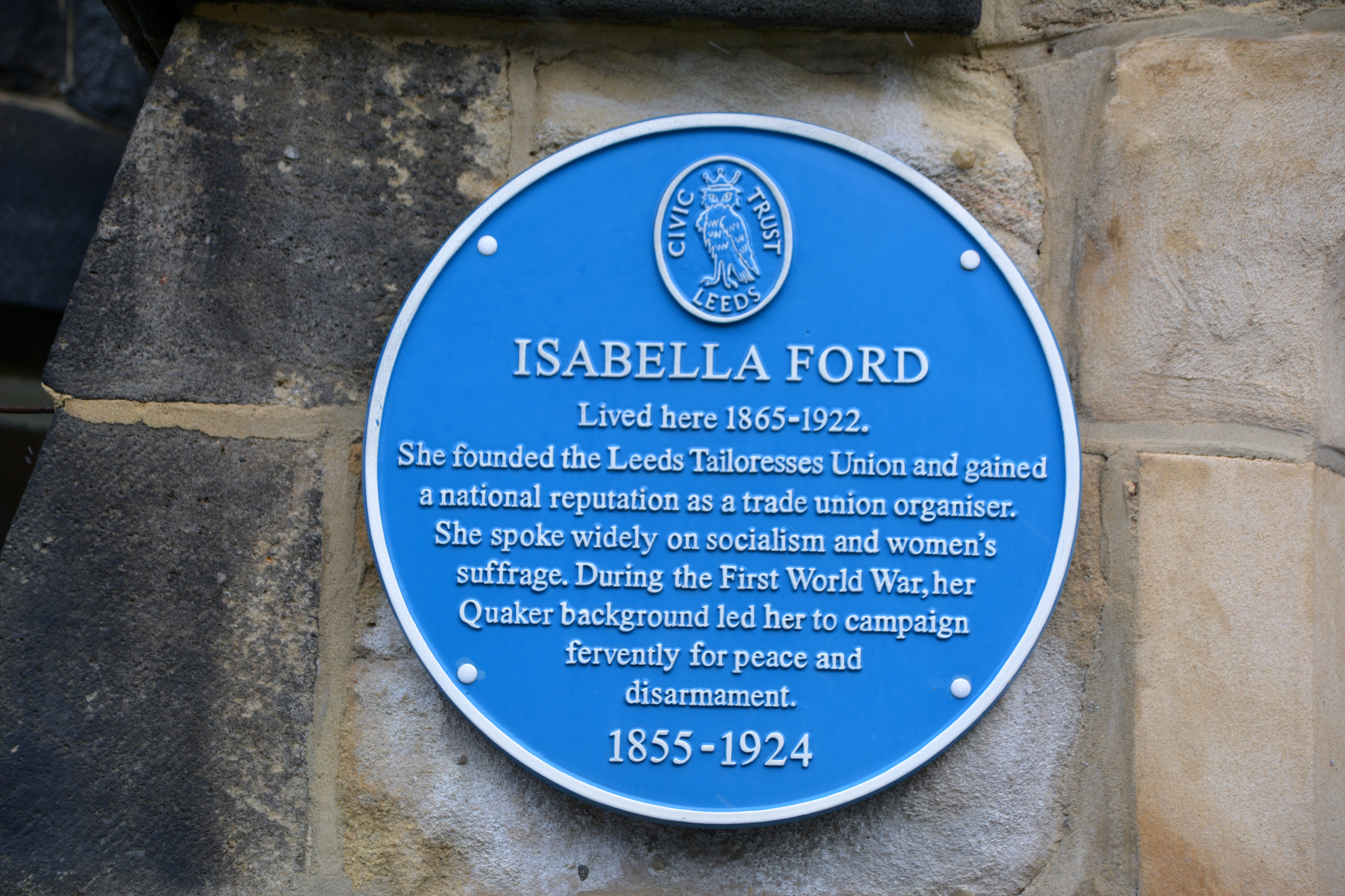 Adel Grange